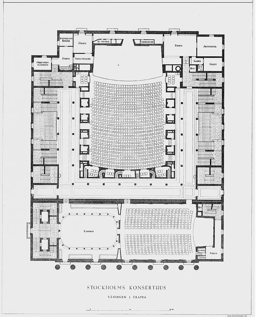 Konserthuset plan våning 1 trappa